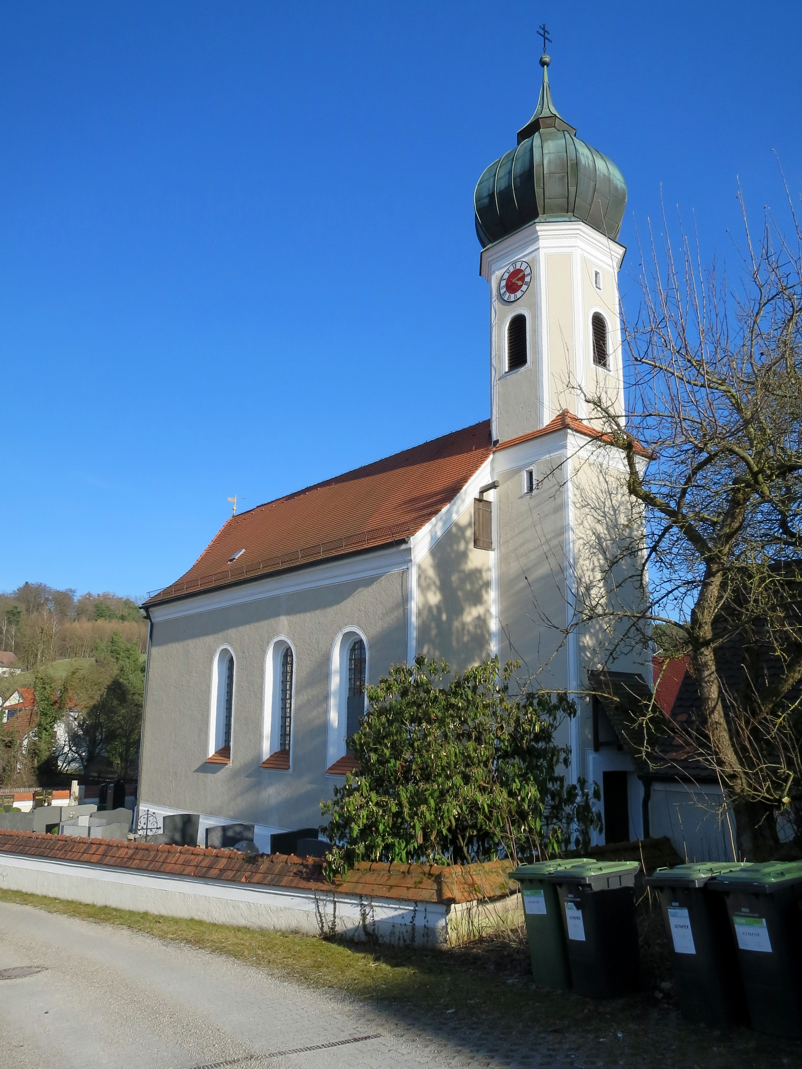 Die Filialkirche des Ortsteils Aiterbach